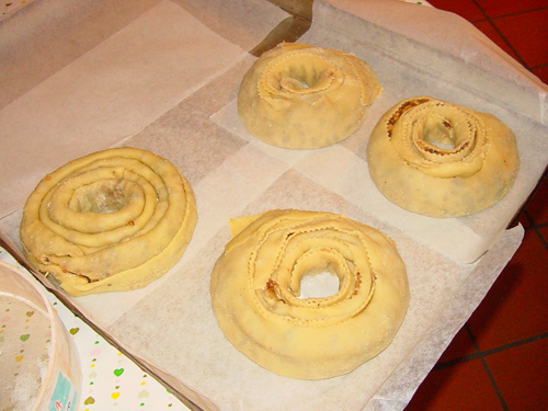 Pitta 'mpigliata lavorazione finita - dolce tipico Silano